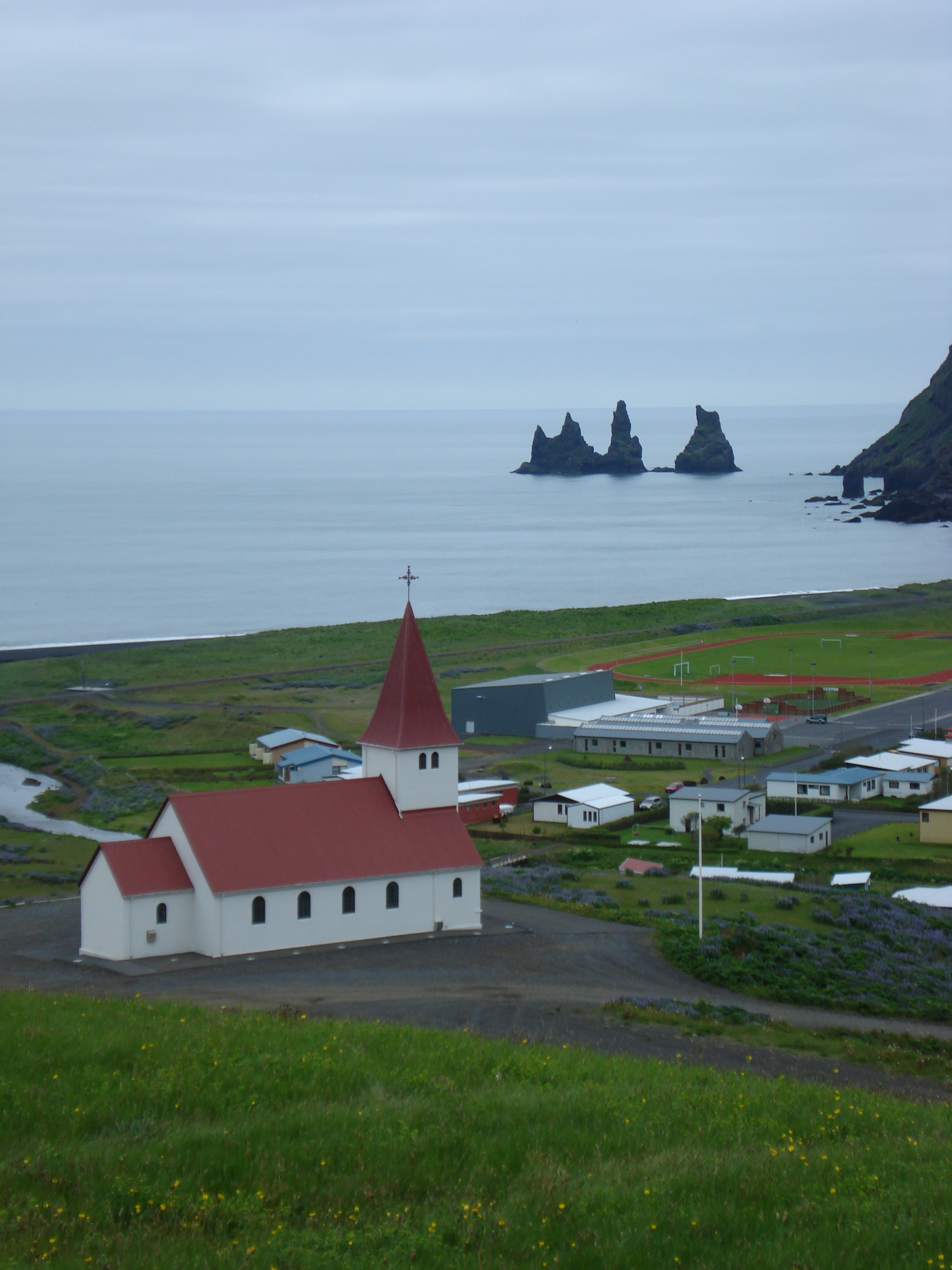 Vík í Mýrdal, Iceland